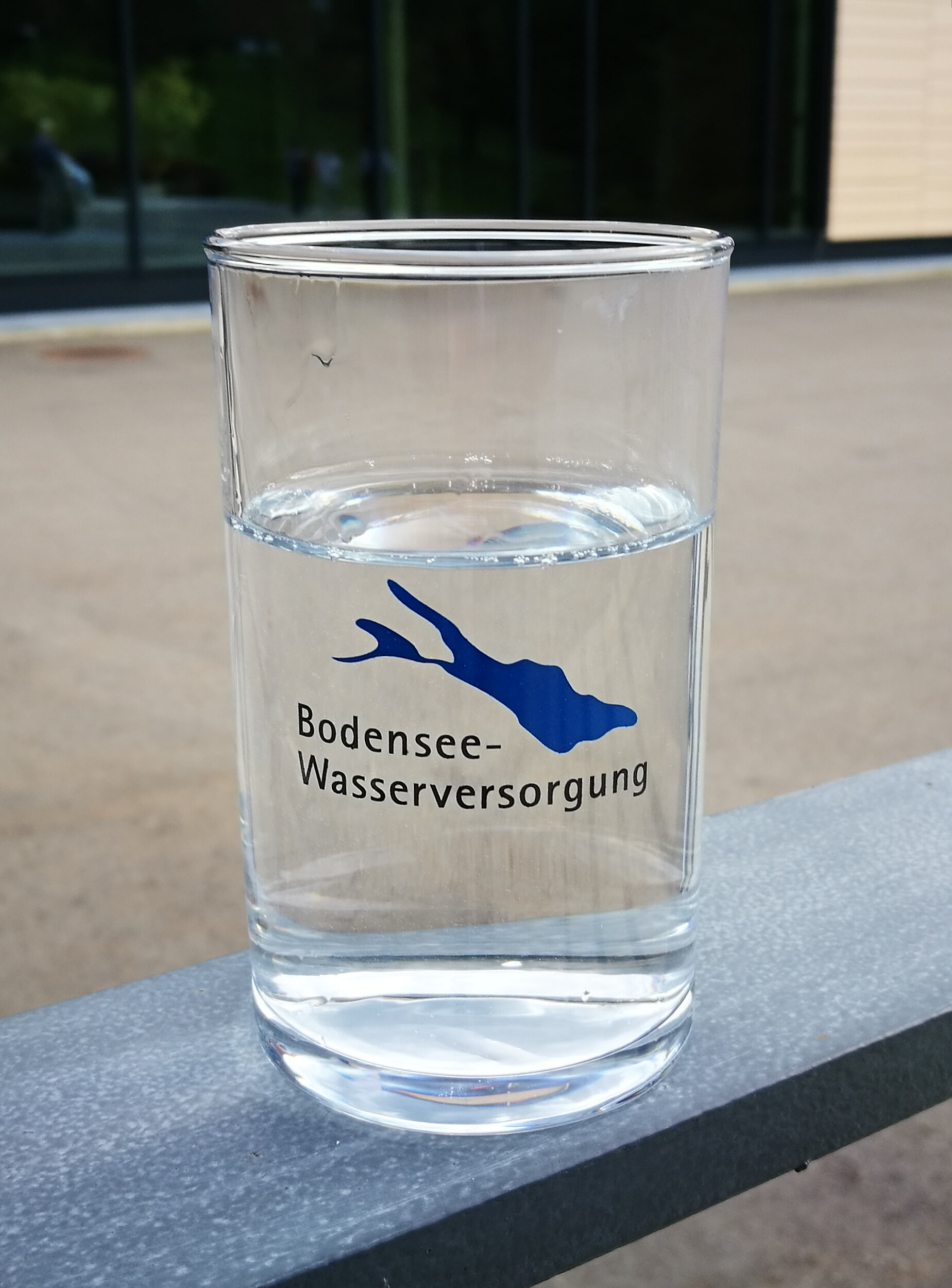 Deutschland (D) - Baden-Württemberg (BW) - Bodenseekreis (FN) - Überlingen: Trinkglas der Bodensee-Wasserversorgung